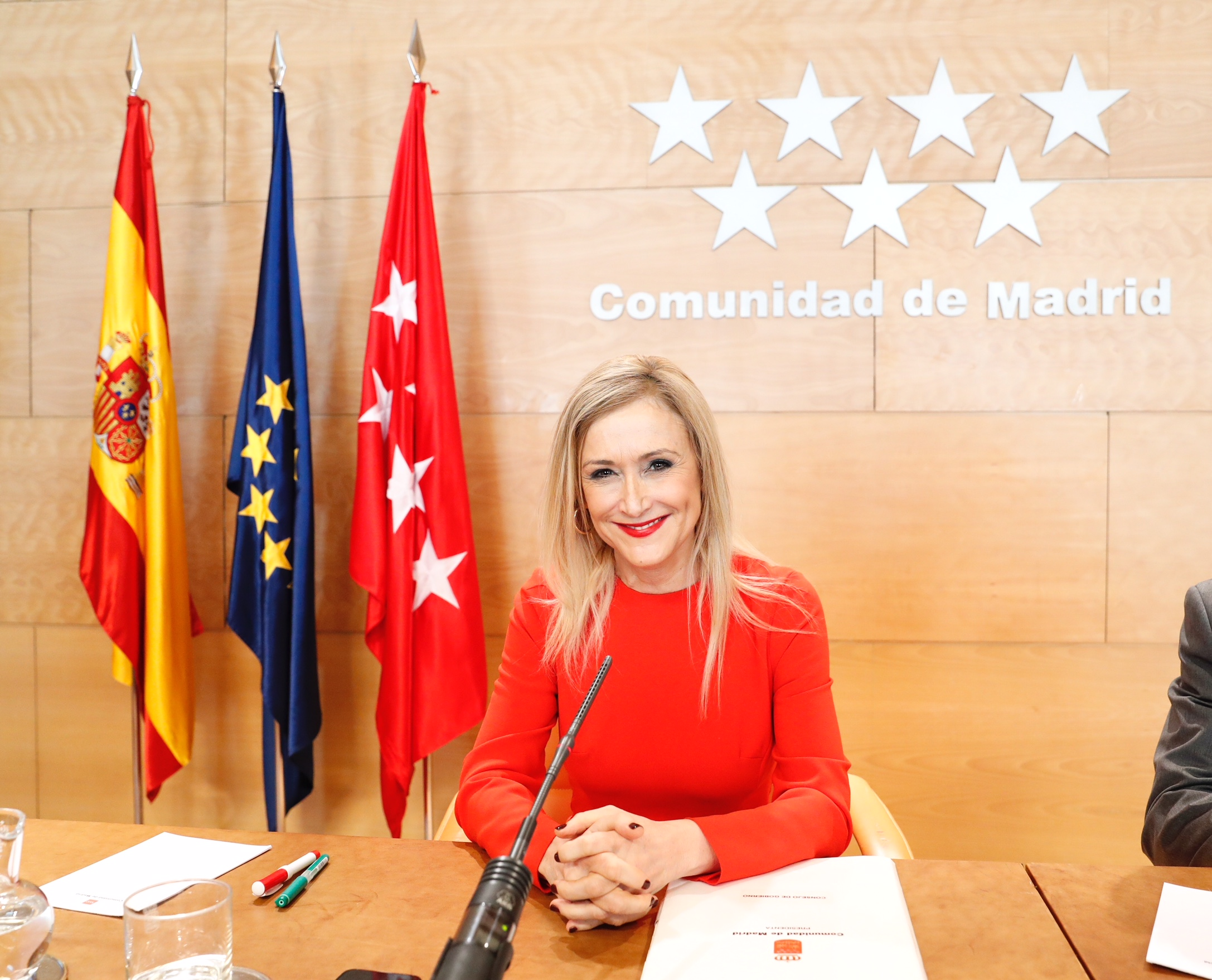 Seguimos trabajando por los madrileños. Hoy hemos adoptado importantes acuerdos para nuestra región, pero por encima de todo, para las personas: - Destinamos más de 15 millones para recuperar y poner a disposición de los vecinos la Finca Vista Alegre. Los jardines podrían abrirse ya el año que viene. - Rebajamos el precio de las Escuelas Infantiles por tercer curso consecutivo, y la reducción alcanza ya el 30%. Otra ayuda a las familias que supone un ahorro de hasta 930€ al año respecto al curso 2015/2016. - Y vamos a destinar 9 millones de euros para iniciar el realojo de las familias más vulnerables en la Cañada Real.